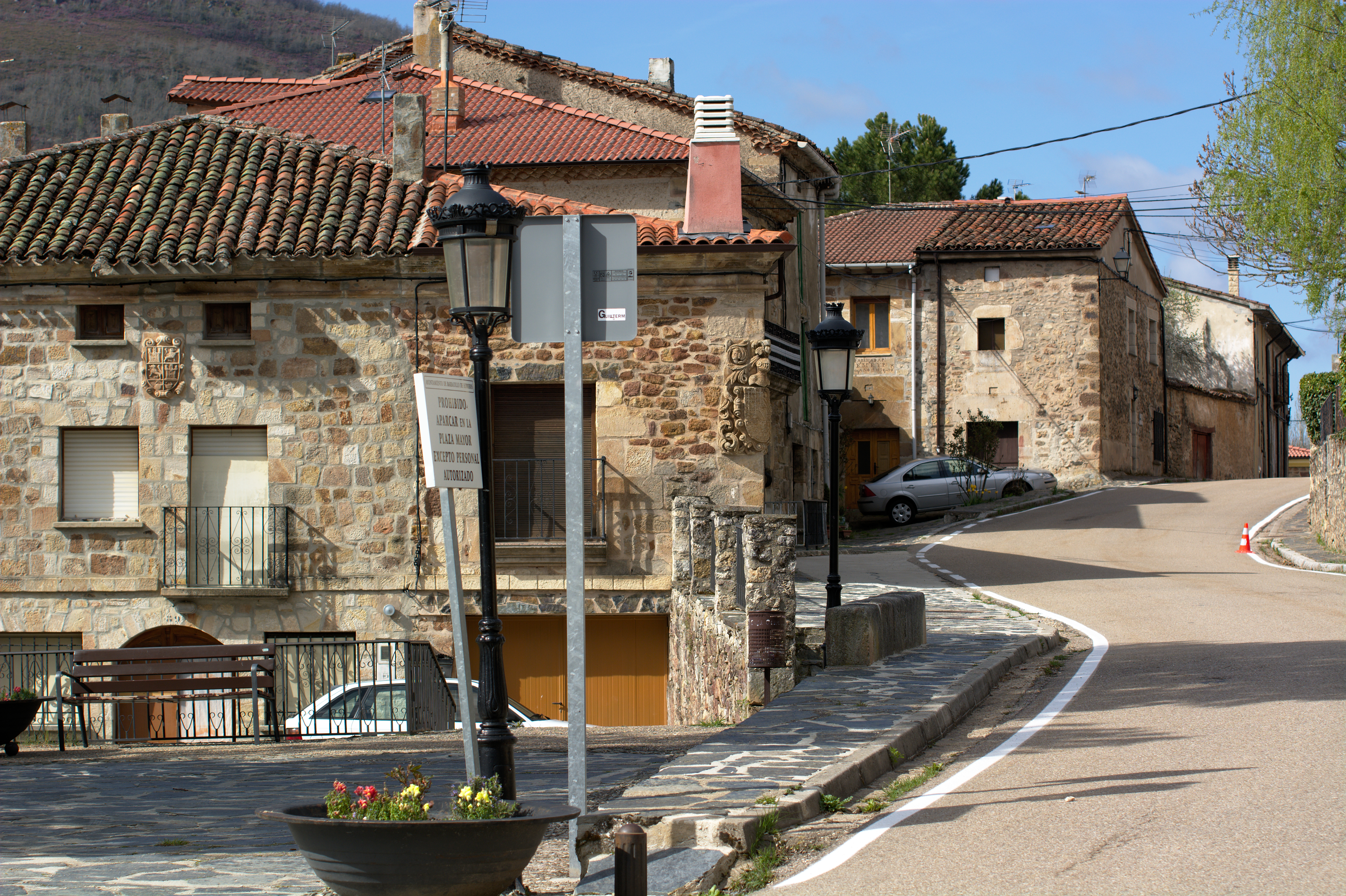 Barbadillo de Herreros